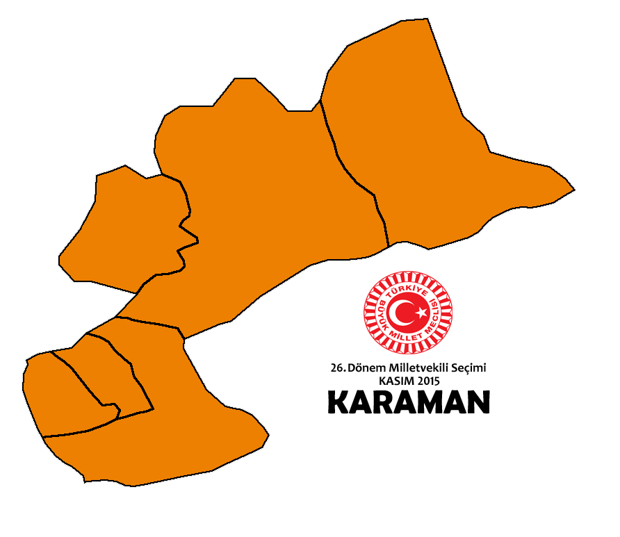 Kasım 2015 seçimleri